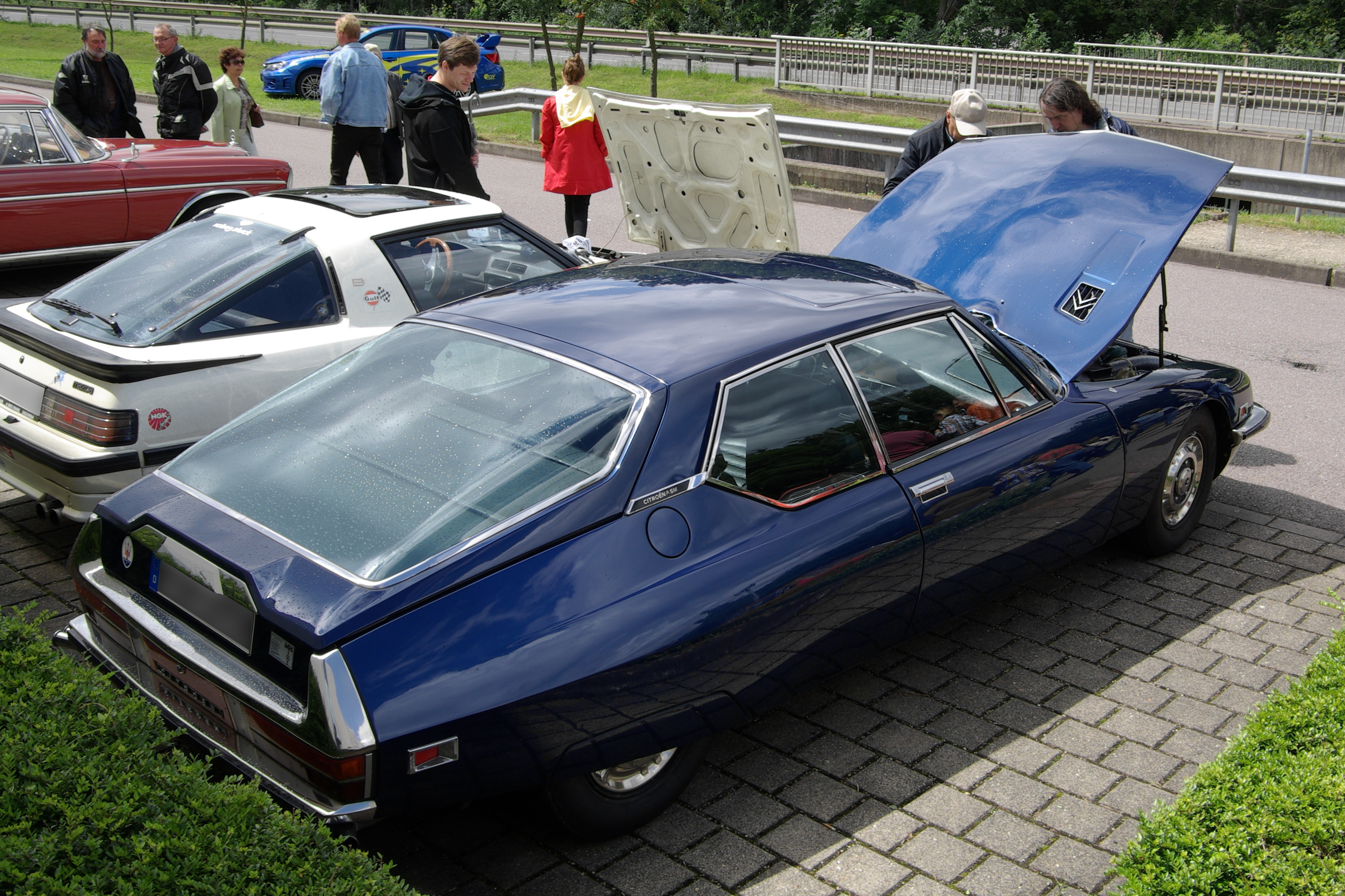 Citroën SM, Baujahr 1973, 28. Internationales Oldtimer-Treffen, Konz